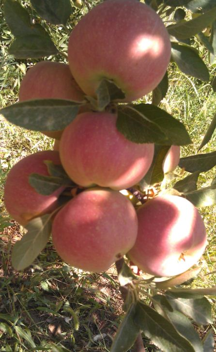 سیب گهواره در تابستان1393